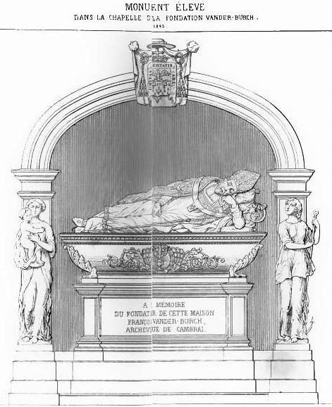 François Van der Burch - Tombeau - 7e archevêque de Cambrai, évêque de Gand, Prince du Saint-Empire, Duc de Cambrai, Comte du Cambrésis